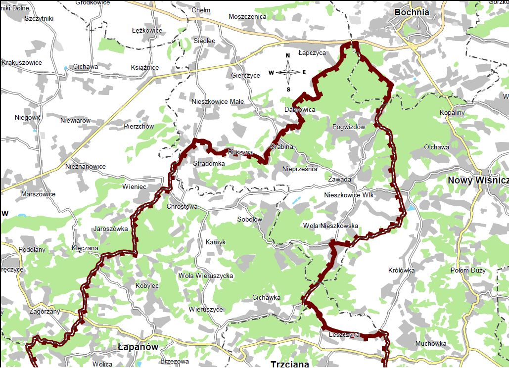 Krajobrazu